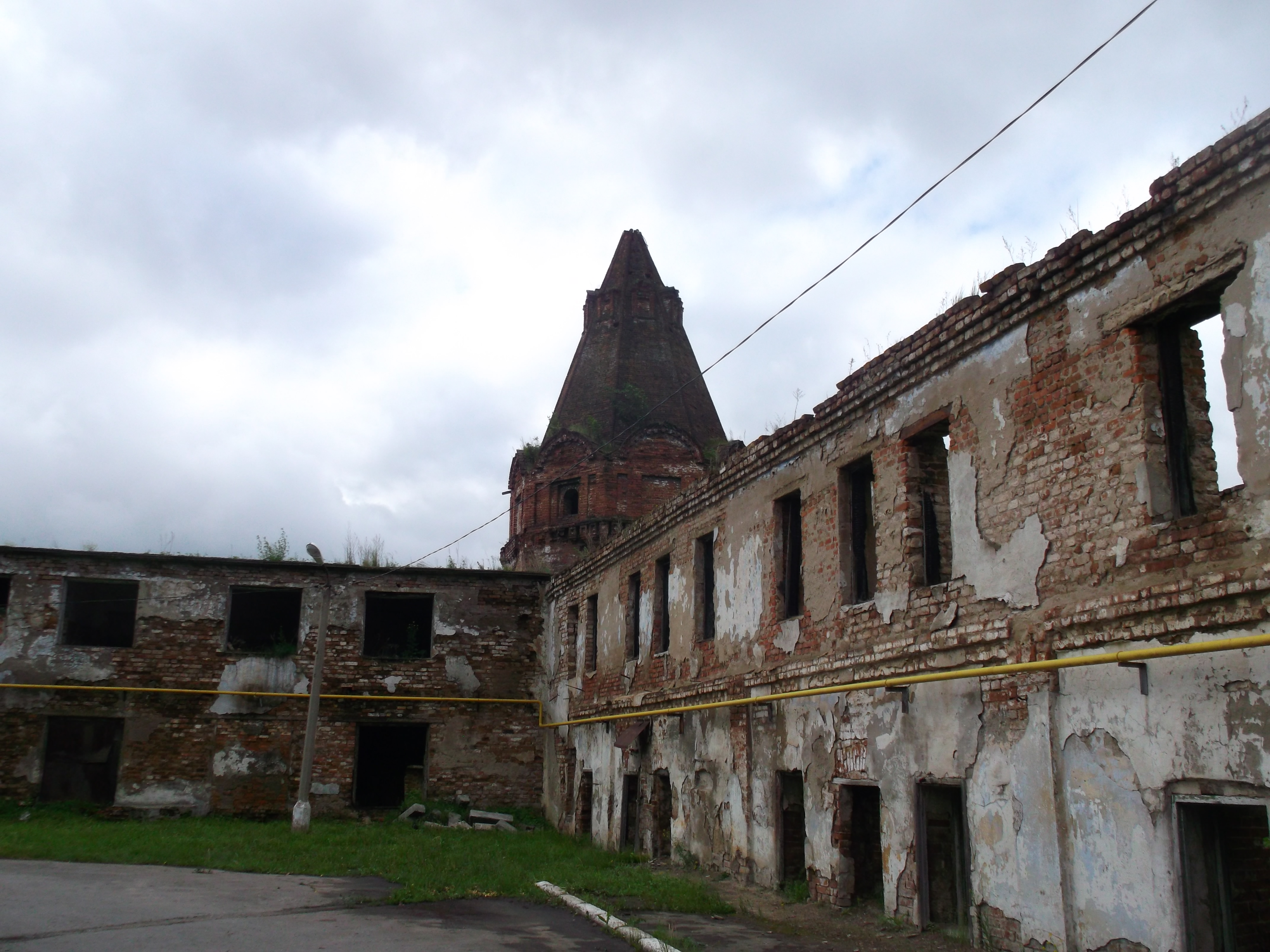 г. Далматово